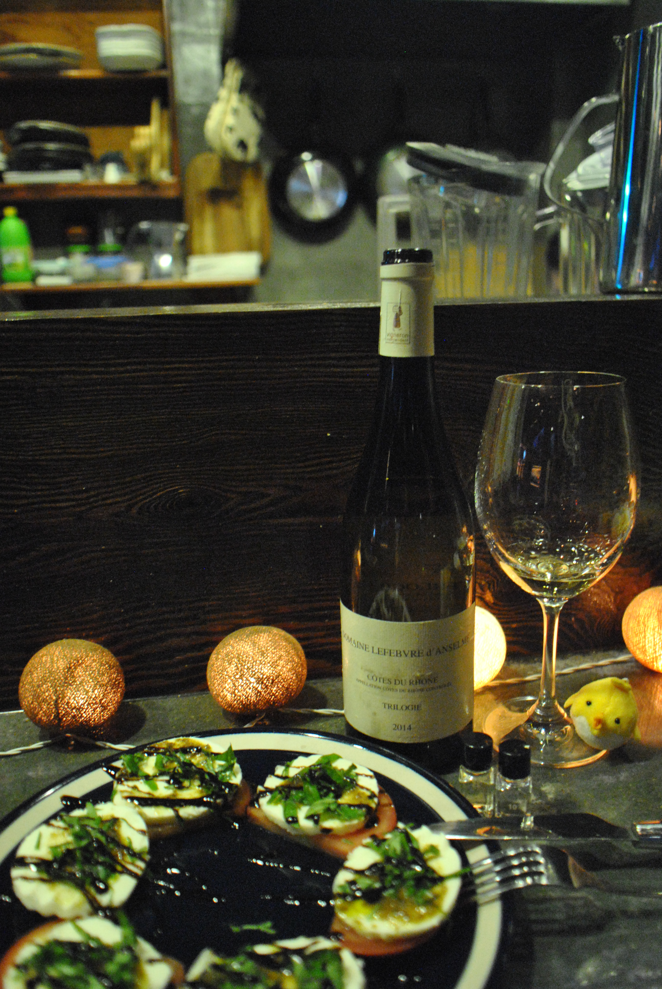 열화된 포도주